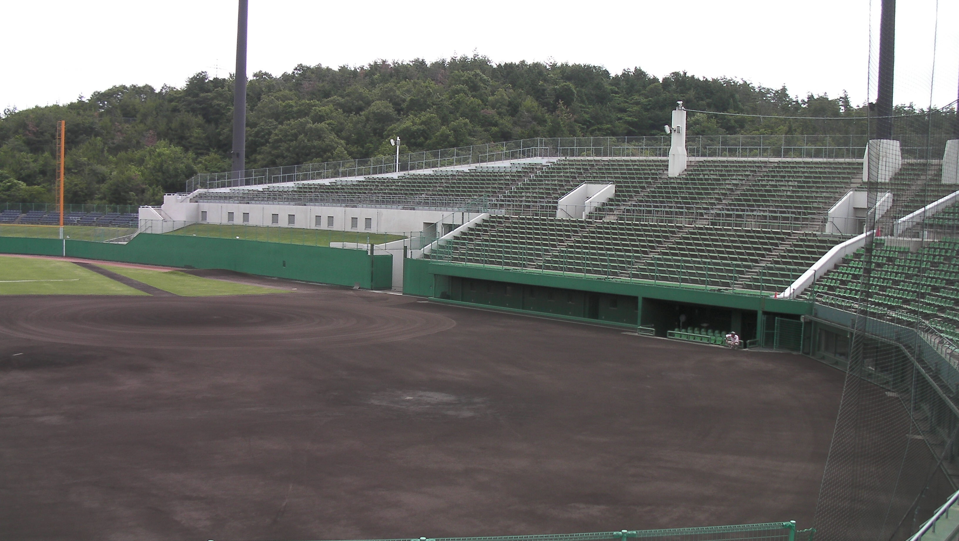 Shimanami Stadium